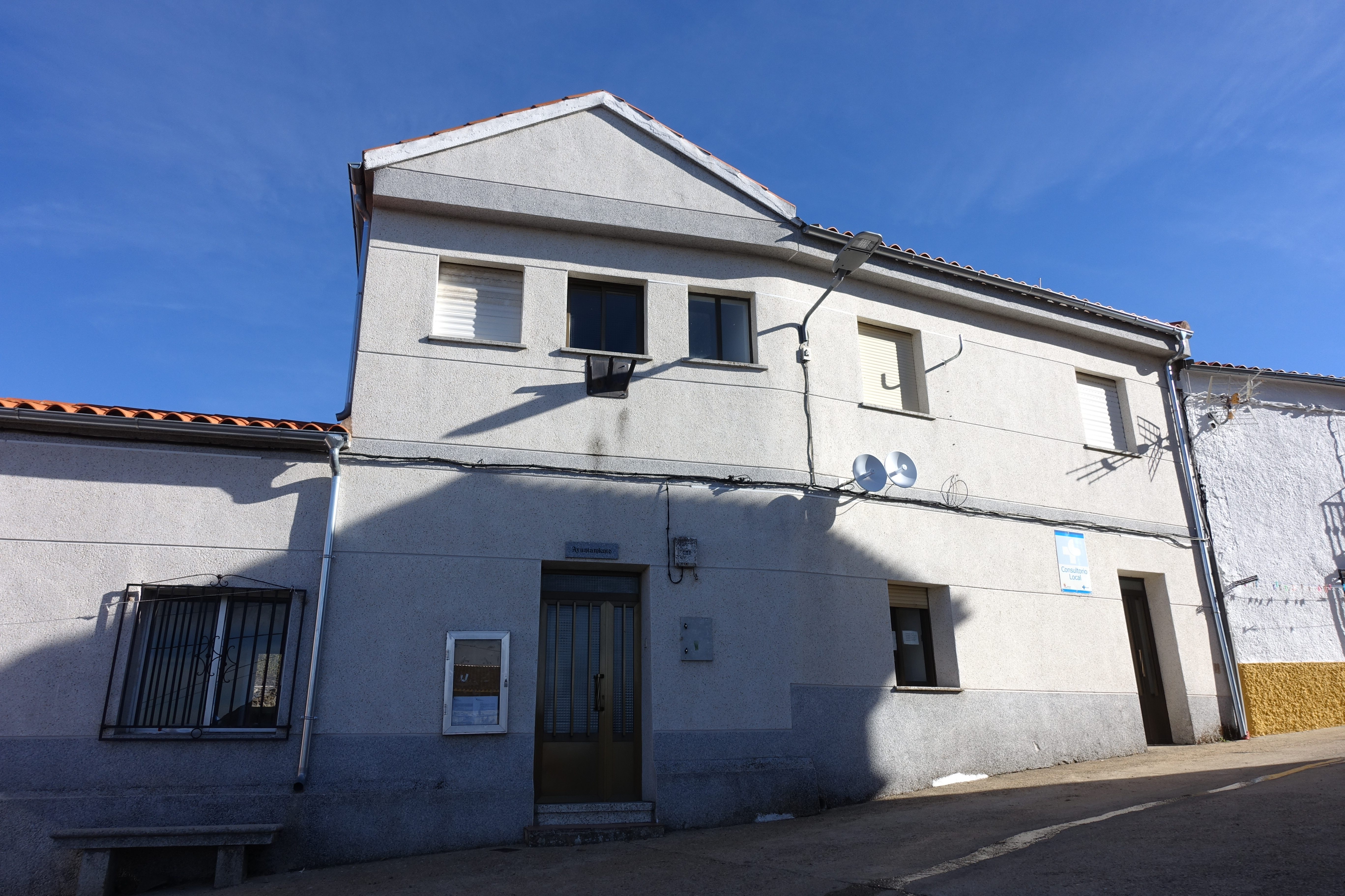 Casa consistorial de Cilleros de la Bastida (Salamanca, España).